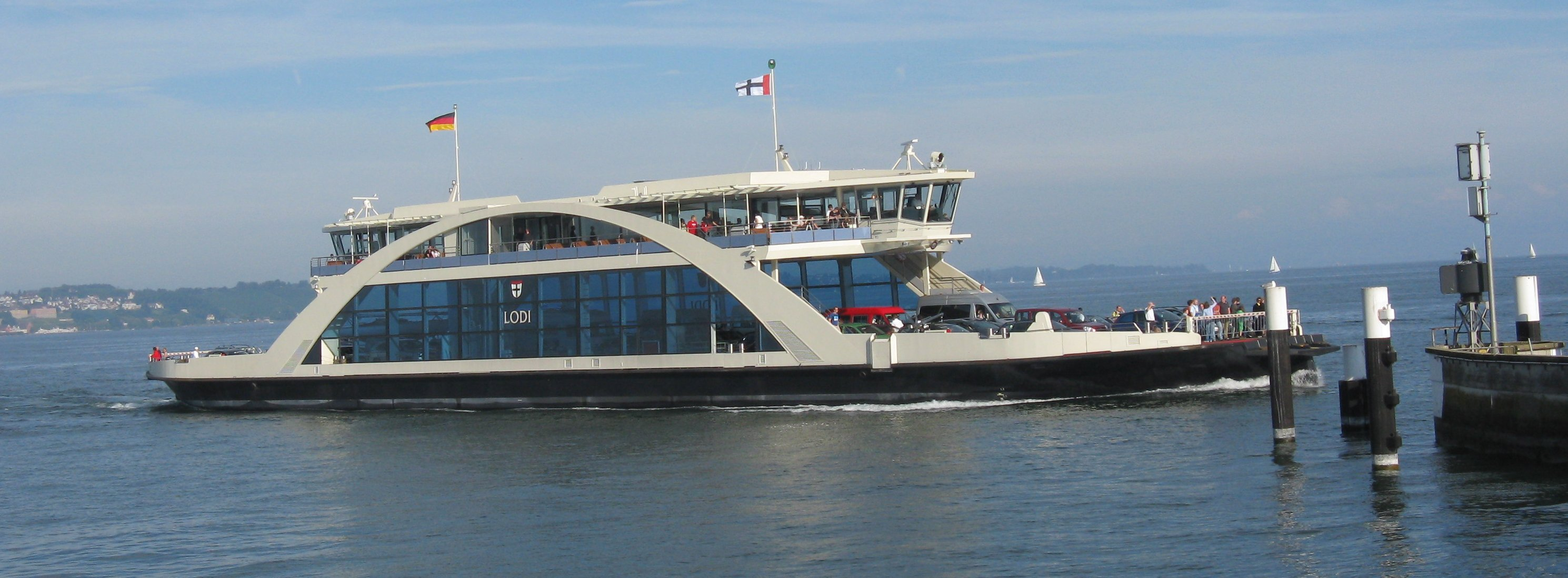 Autofährschiff MF Lodi bei Einfahrt in den Hafen Konstanz-Staad